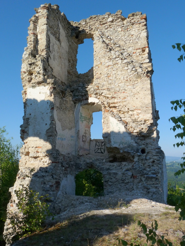 Razvaline gradu Žusem